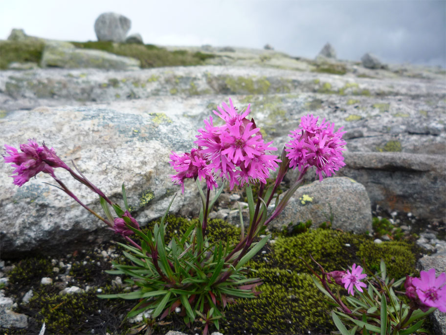 Fjelltjæreblom Lychnis alpina